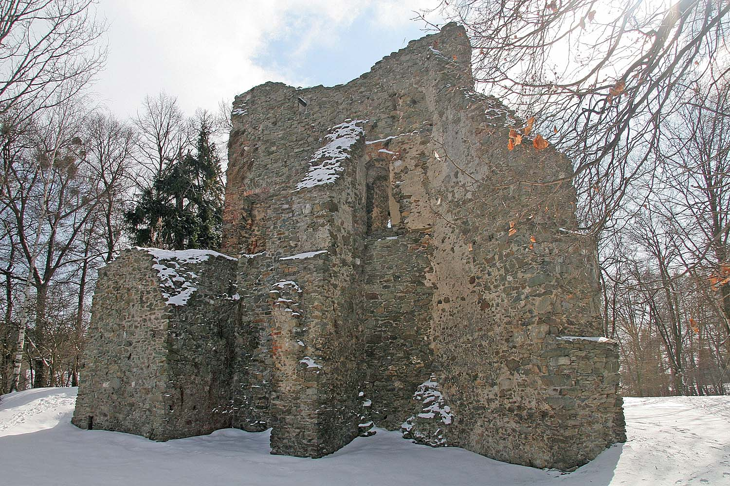 Tvrz ve Svojšicích, District Pardubice autor:Prazak date: 13. 3. 2006